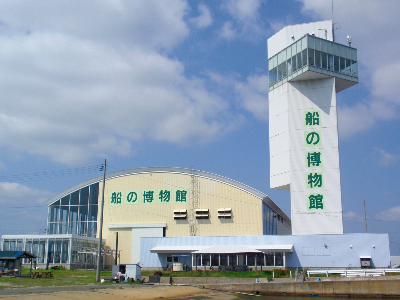 みちのく北方漁船博物館